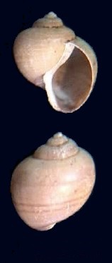 Pomacea falconensis